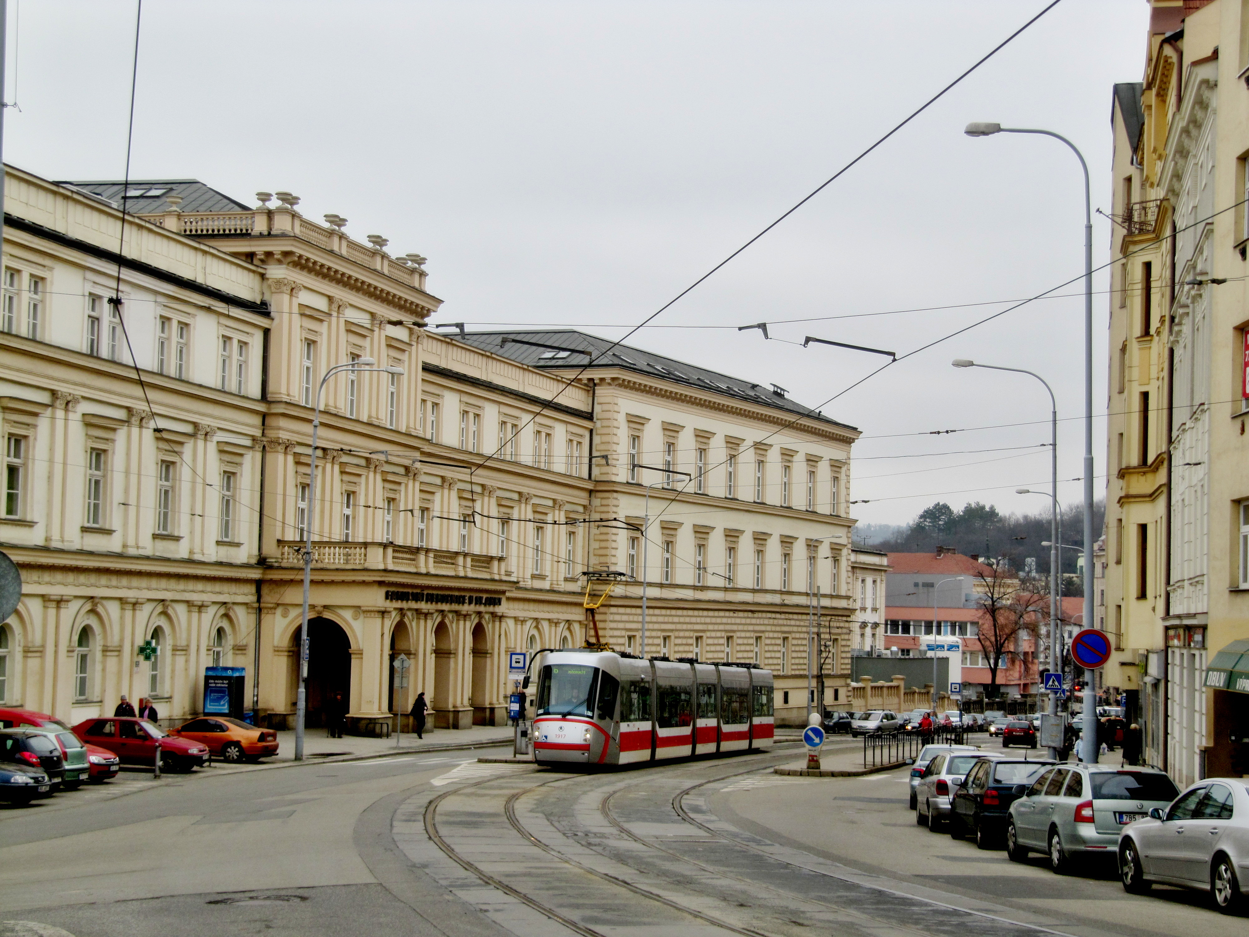 Brno, Pekařská 53, nemocnice U Svaté Anny